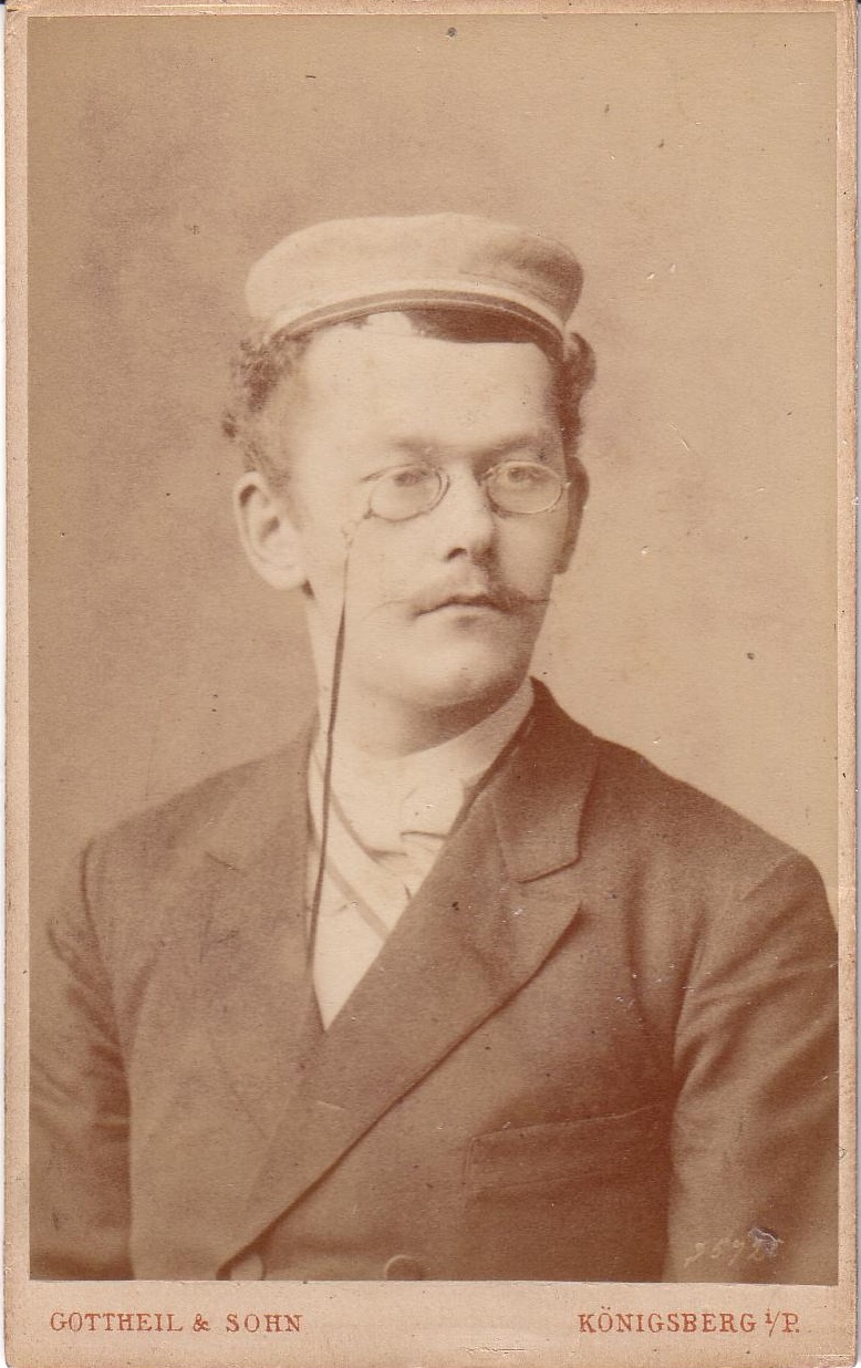 Fotografie von Paul Thomaschki (1861-1934)